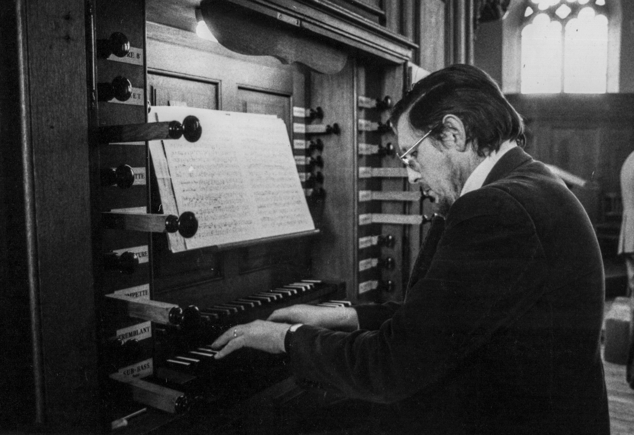 André Isoir au cours d’un concert à l’orgue Silbermann de l’église Trinité St-Georges, ancienne église des Jésuites à Molsheim.